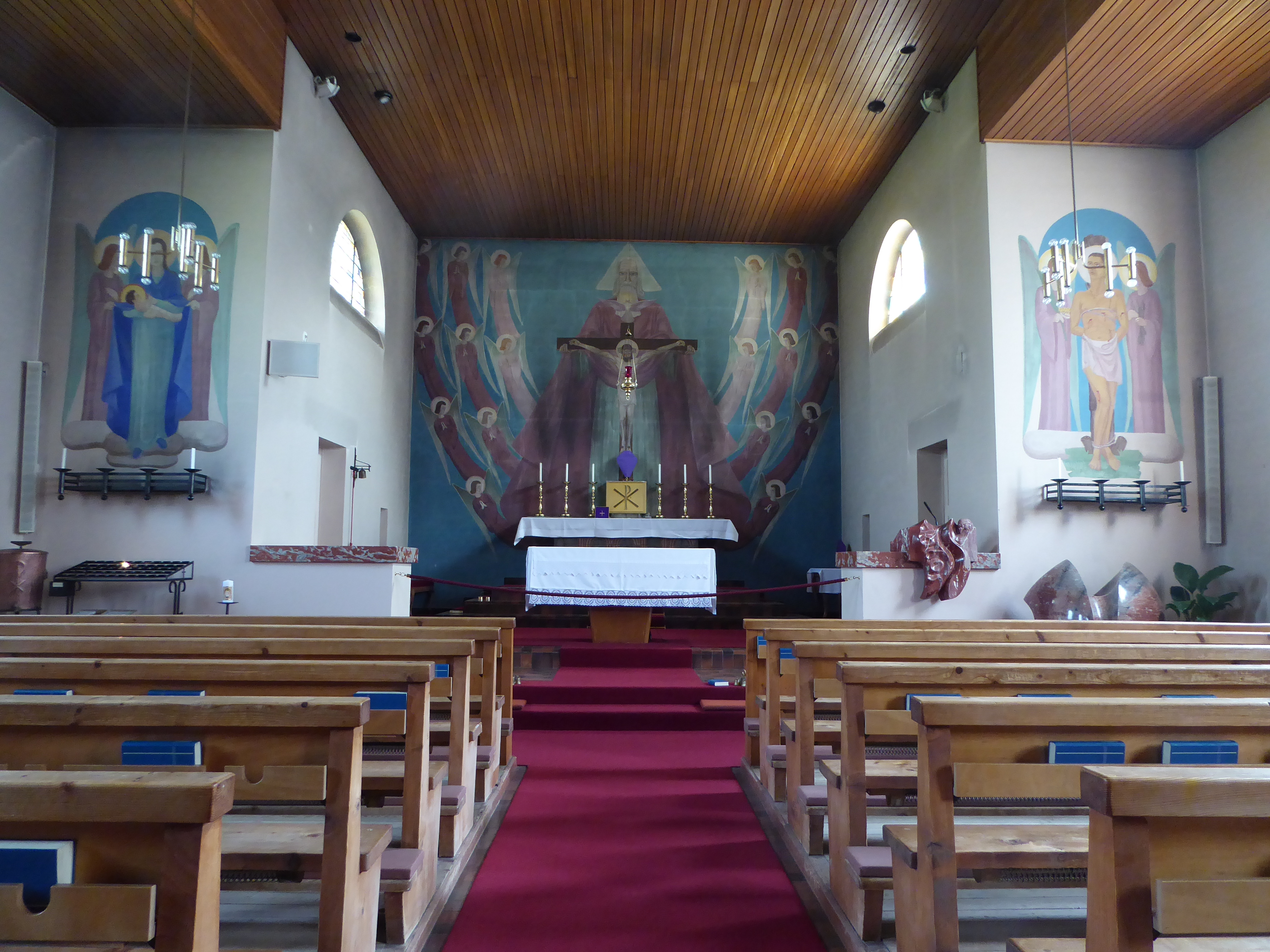 Kapelle Nendeln FL: Chor und Seitenaltäre